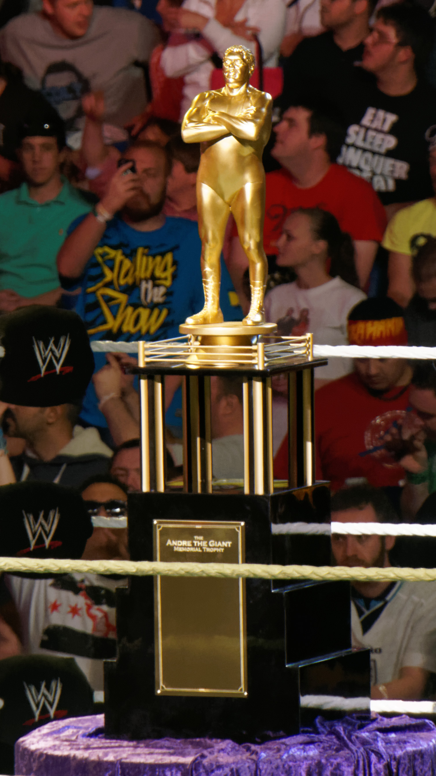 2014-04-07_21-26-24_NEX-6_1613_DxO